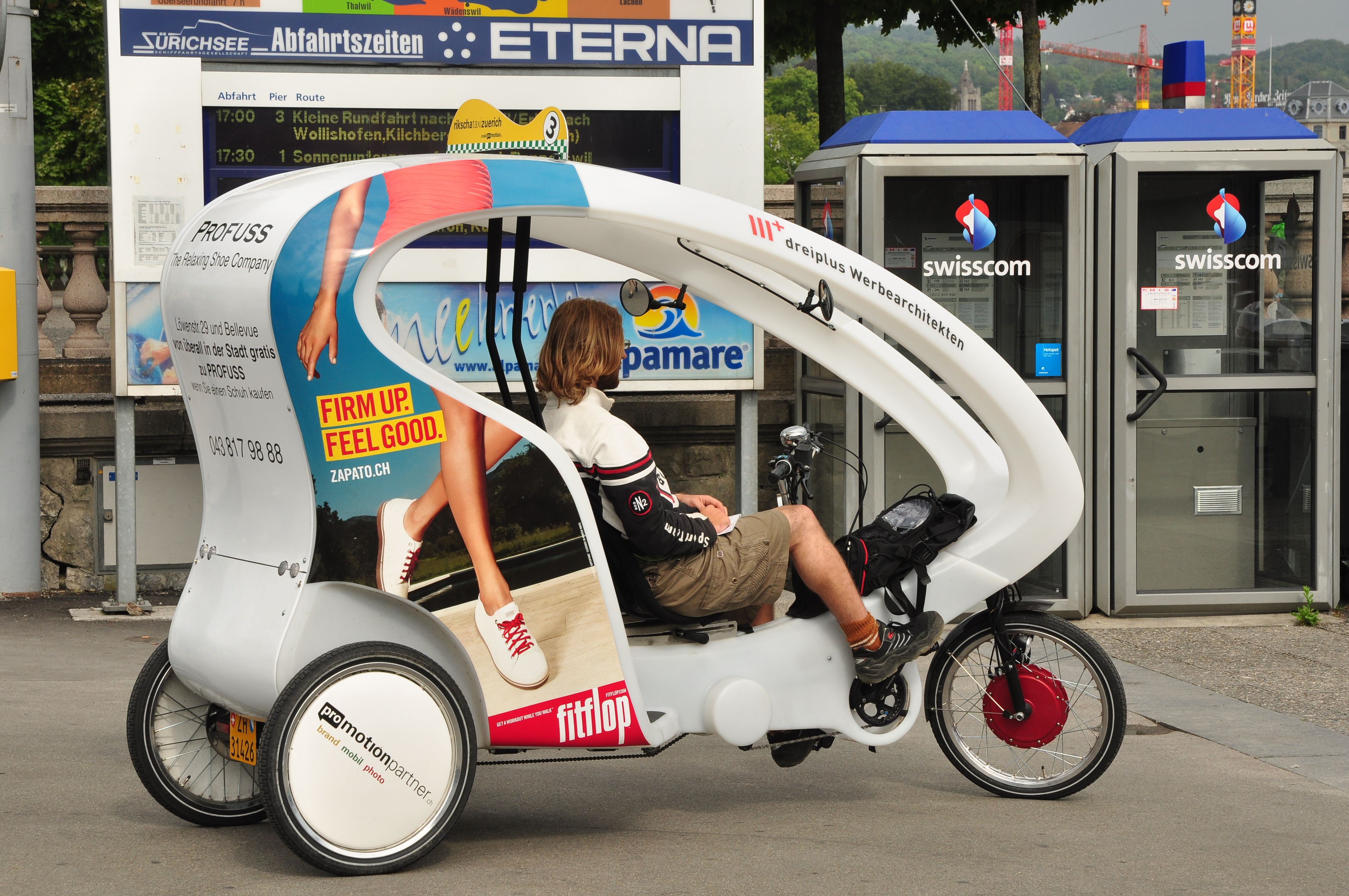 Rikscha Taxi Zürich at the Zürichsee-Schifffahrtsgesellschaft (ZSG) landing gate, Bürkliplatz in Zürich (Switzerland)